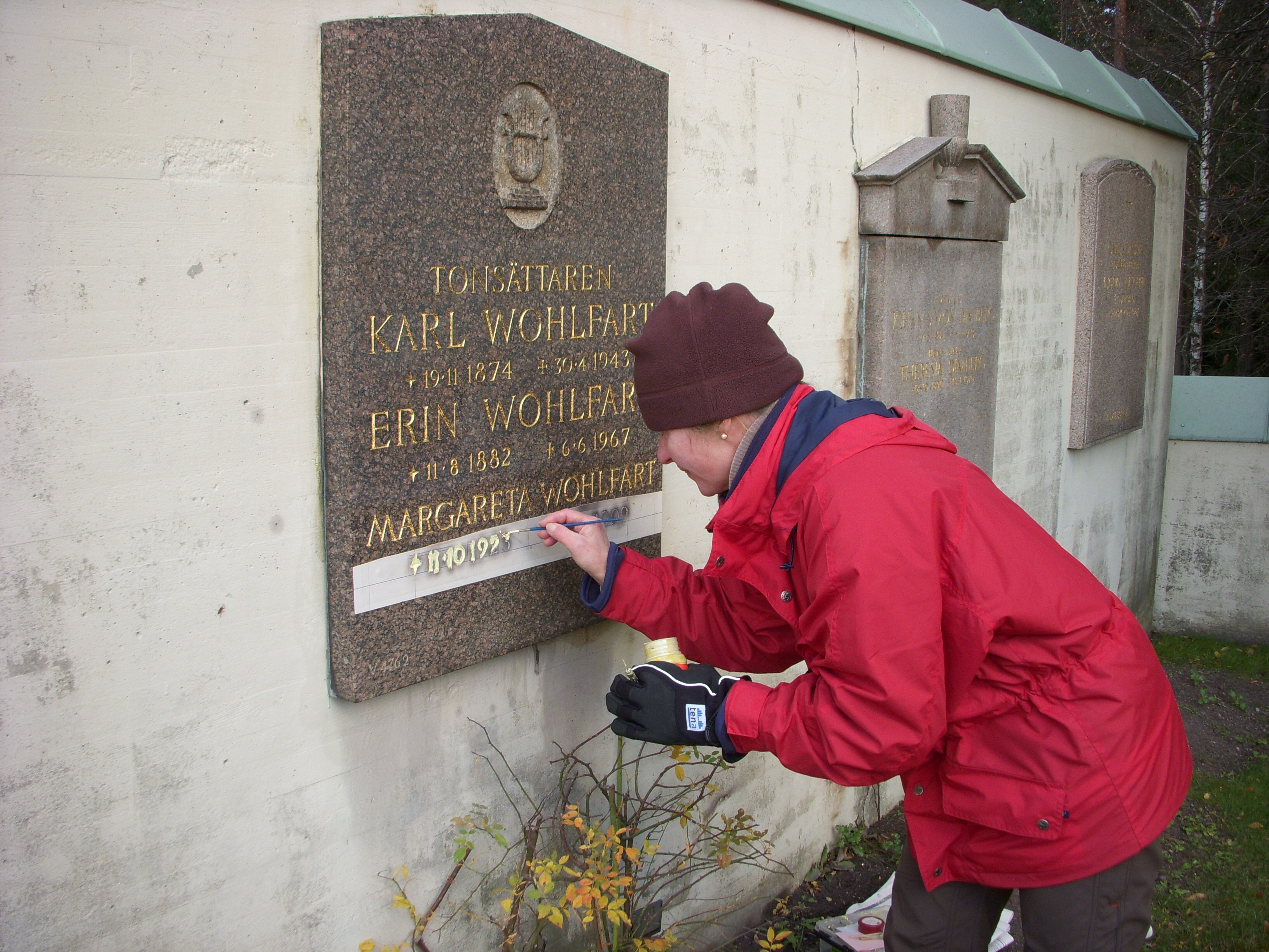 Skogskyrkogården i Stockholm, förgyllning av en inskription